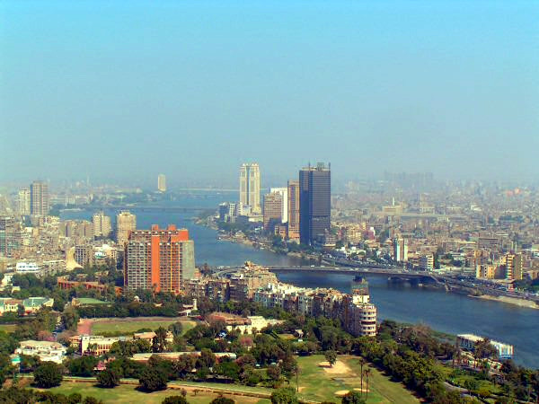 Blick vom Cairo Tower auf das Zentrum von Kairo Fotografiert am 6. Oktober 2003 Fotograf: Martin Steiger Uploader: Martin Steiger